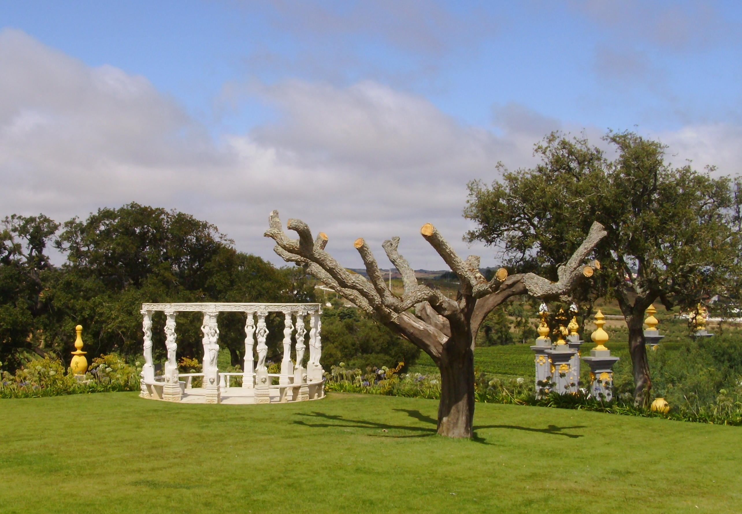 Quinta dos Loridos, freguesia do Carvalhal, concelho do Bombarral, distrito de Leiria, Portugal.